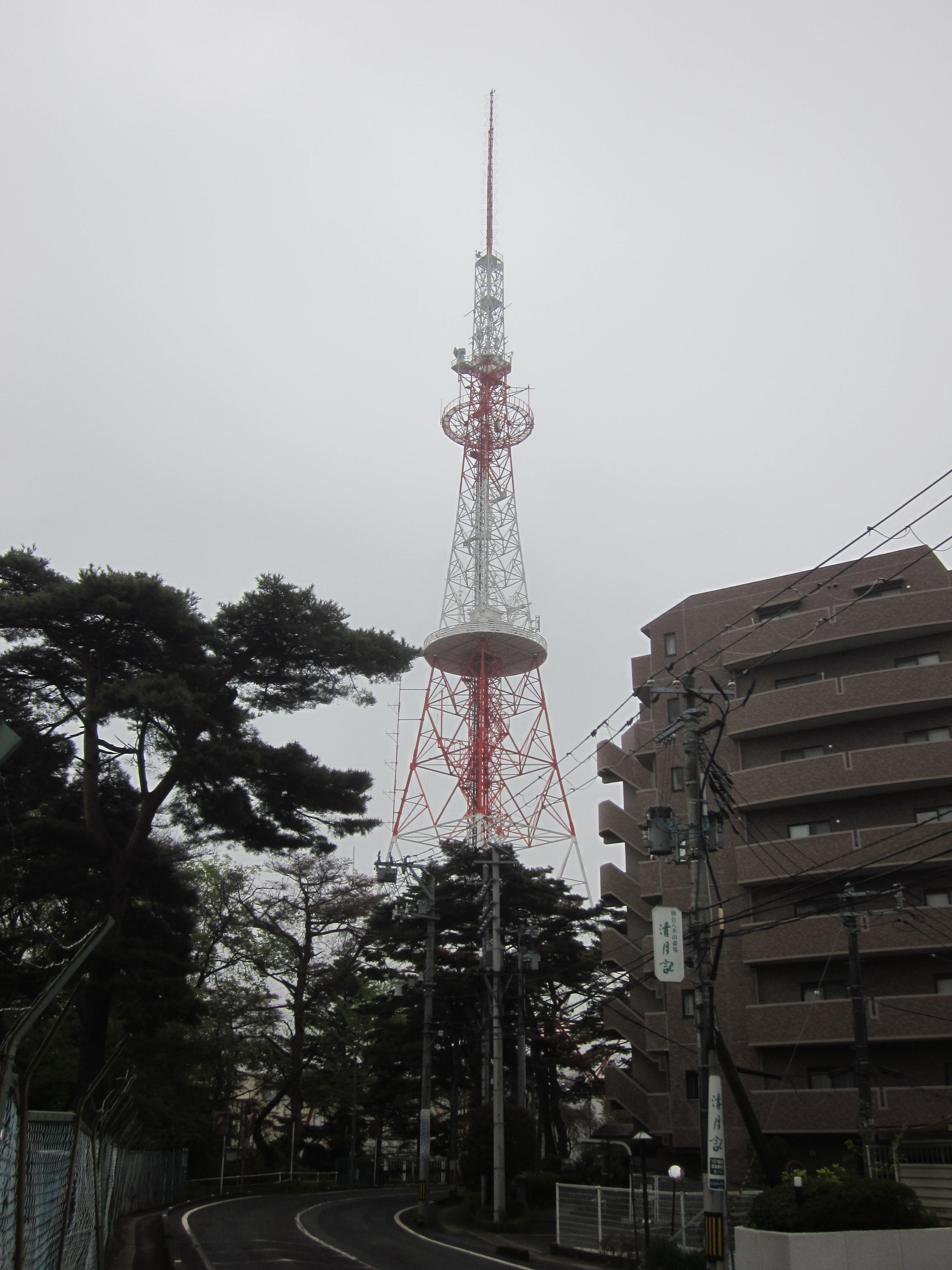 2016年5月2日、投稿者自身による撮影。